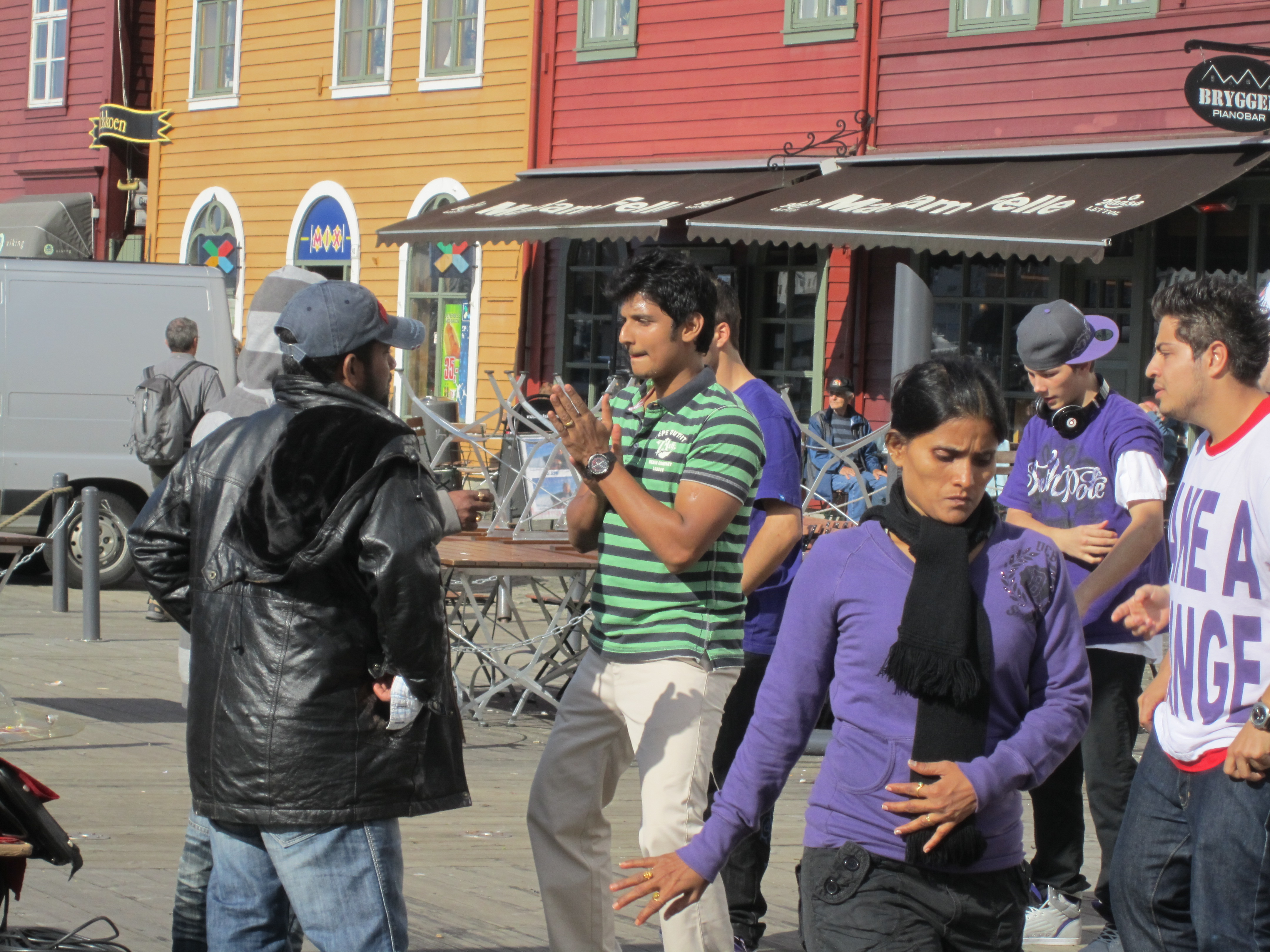 2010 - வெளிநாட்டில் தமிழ் படப்பிடிப்பு, பேர்கன் நகரின் Bryggen இல் 'கோ' படப்பிடிப்பு, படப்பிடிப்புக் குழுவினர் தயார்ப்படுத்தலில் ஈடுபட்டு இருக்கின்றனர்.